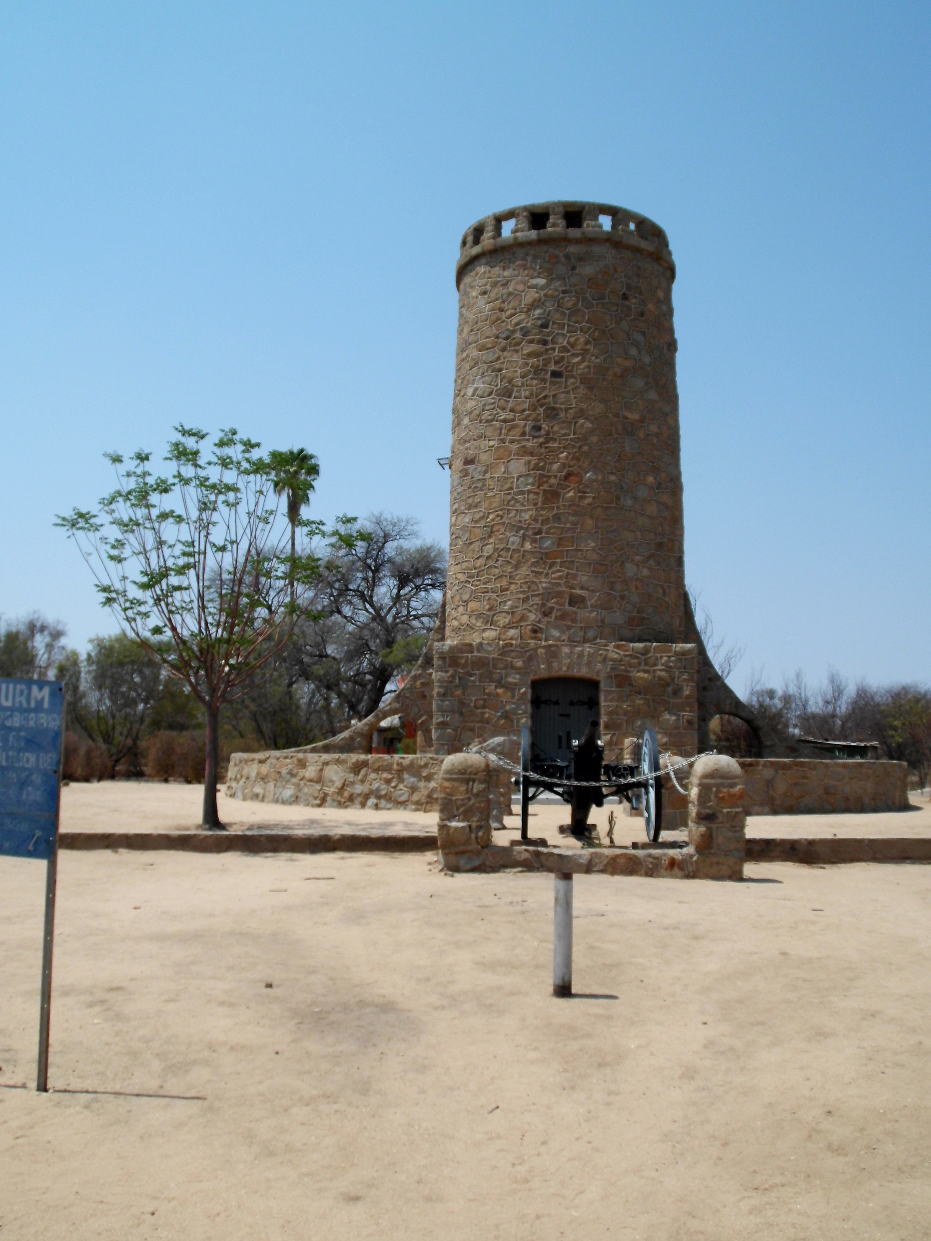 Franke-Turm in Omaruru, 1908